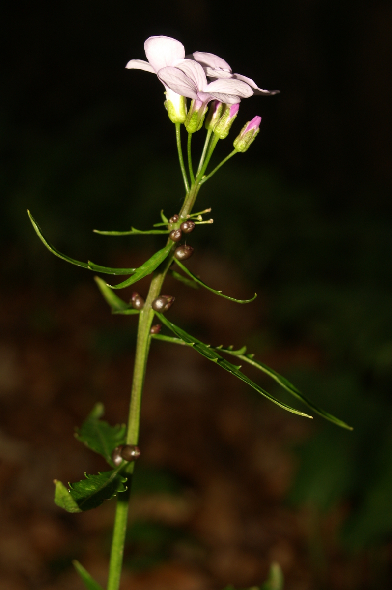 Brstična konopnica v Čolnišču.